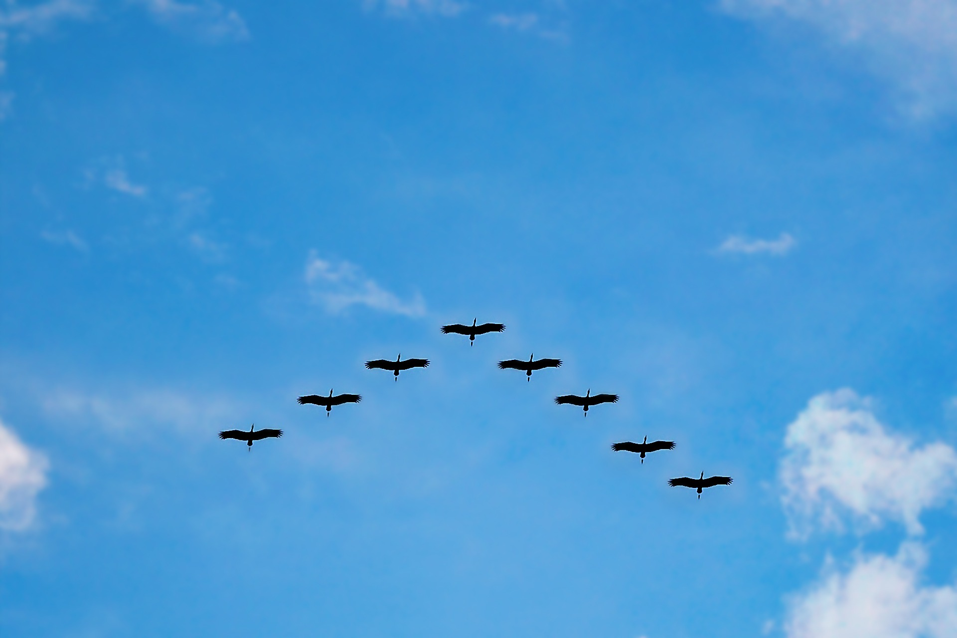 Migration d'oiseau en V